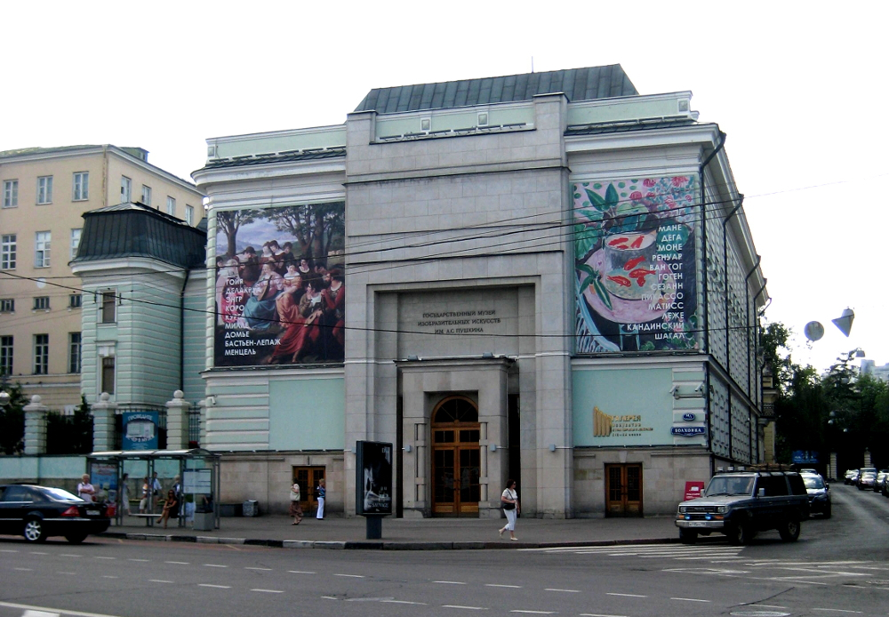 ГМИИ. Галерея искусства стран Европы и Америки XIX–XX вв.